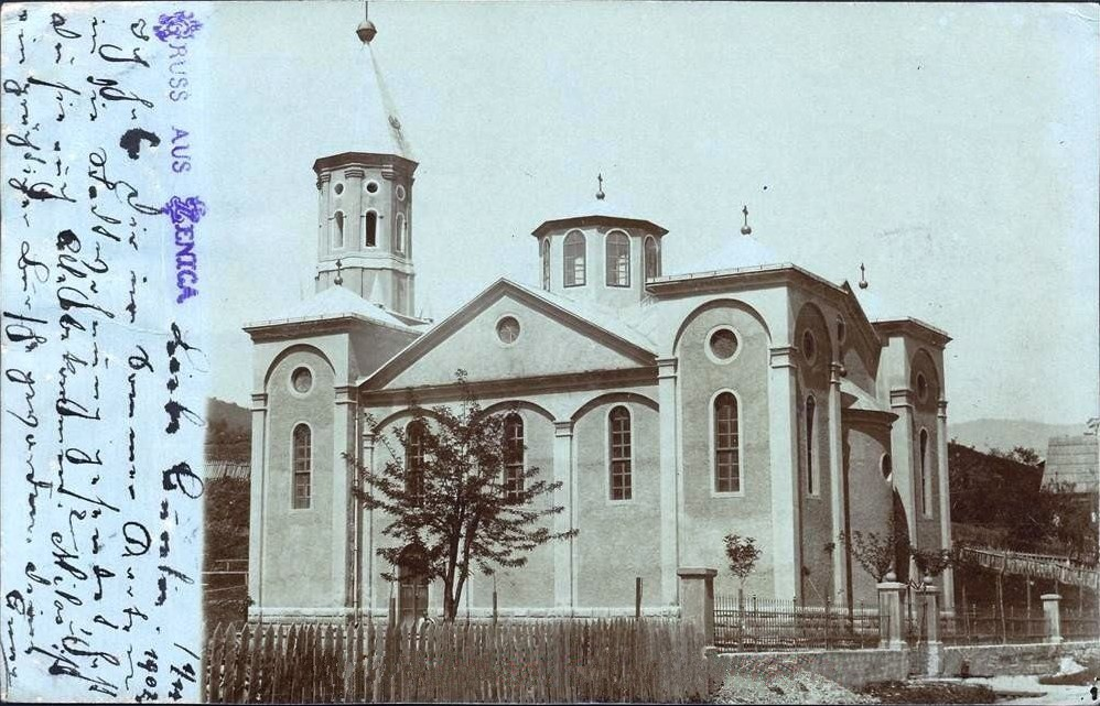 1902, православна Црква Рођења Пресвете Богородице у Зеници (на Царини) Дио Фејсбук објаве поводом 130 ГОДИНА ОД ОСВЕШТАЊА ПРАВОСЛАВНЕ ЦРКВЕ У ЗЕНИЦИ У Зеници је прва позната православна црква изграђена око 1836. на приватном посједу. Била је то модификована стамбена кућа Јове Дунђеровића у махали Куловица, коју је водио парох Стеван Поповић (1833.-1860.). Тај објект је срушен око 1907. године. Након смјене окупатора 1878, повећао се број становника у Зеници, па тако и православних што је изискивало нови и већи вјерски објекат. Тако је 1882. одлучено да се почне са градњом нове православне Цркве Рођења Пресвете Богородице. Узор за градњу је била Саборна црква у Сарајеву, што се успјело дјелимично провести распоредом простора. Ипак, због слабе економске моћи православног становништва и изостанка помоћи аустријске управе, објекат је био мањи величином, а нису урађене предвиђене куполе. Радови су почели 1883. уз благослов митрополита Саве Косановића. Објекат је завршен на Малу Госпојину (празник Рођења Пресвете Богородице) 1885. Новосаграђену цркву освештао је митрополит Косановић на дан 21. август 1889. Црква је 2009. године проглашена националним спомеником. На разгледници је православна црква снимљена 1902. године.